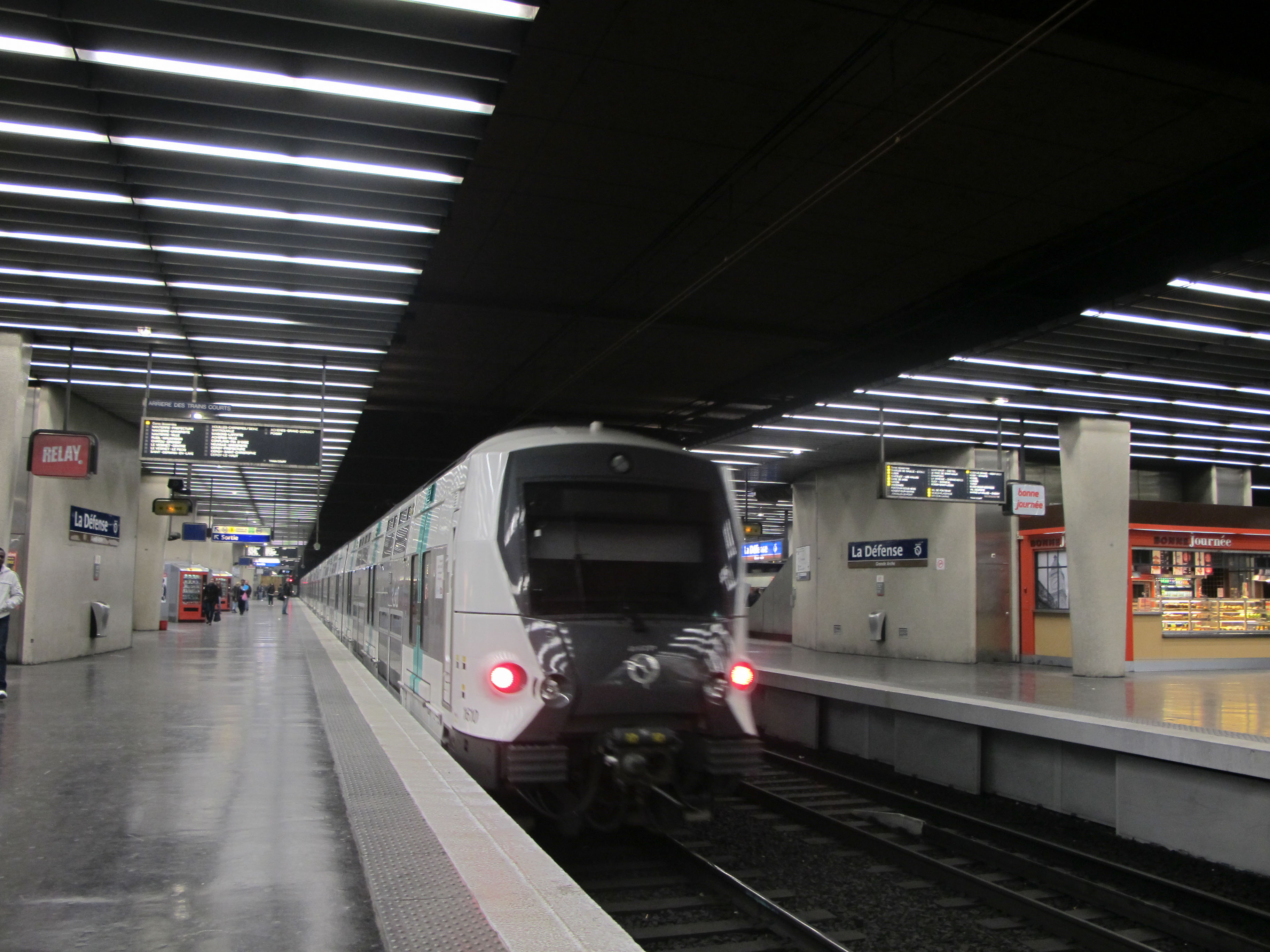 Rame MI09 du RER A, station La Défense, Ile de France. France